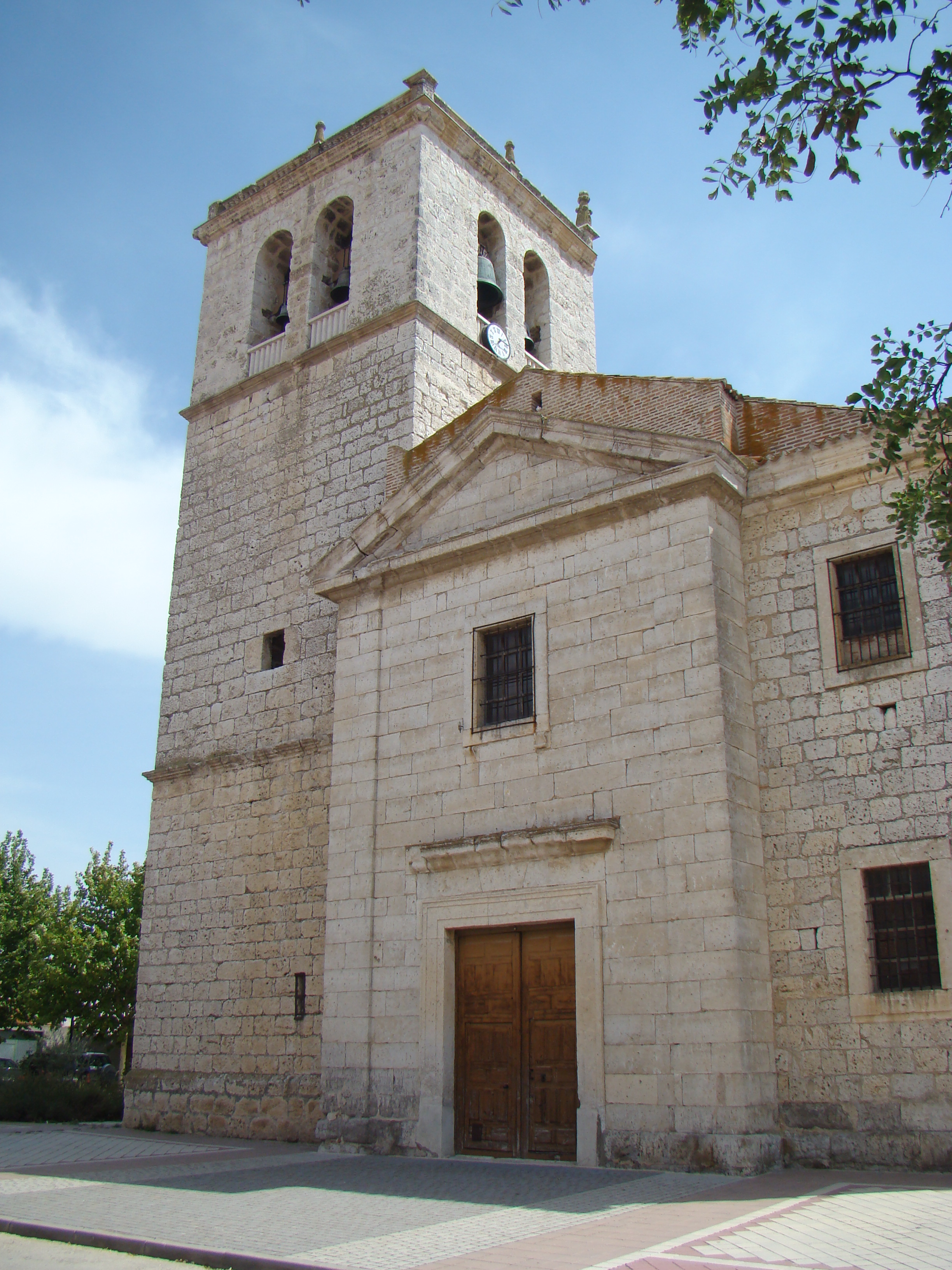 La Pedraja de Portillo en la provincia de Valladolid (España). Iglesia y torre de la Asunción.